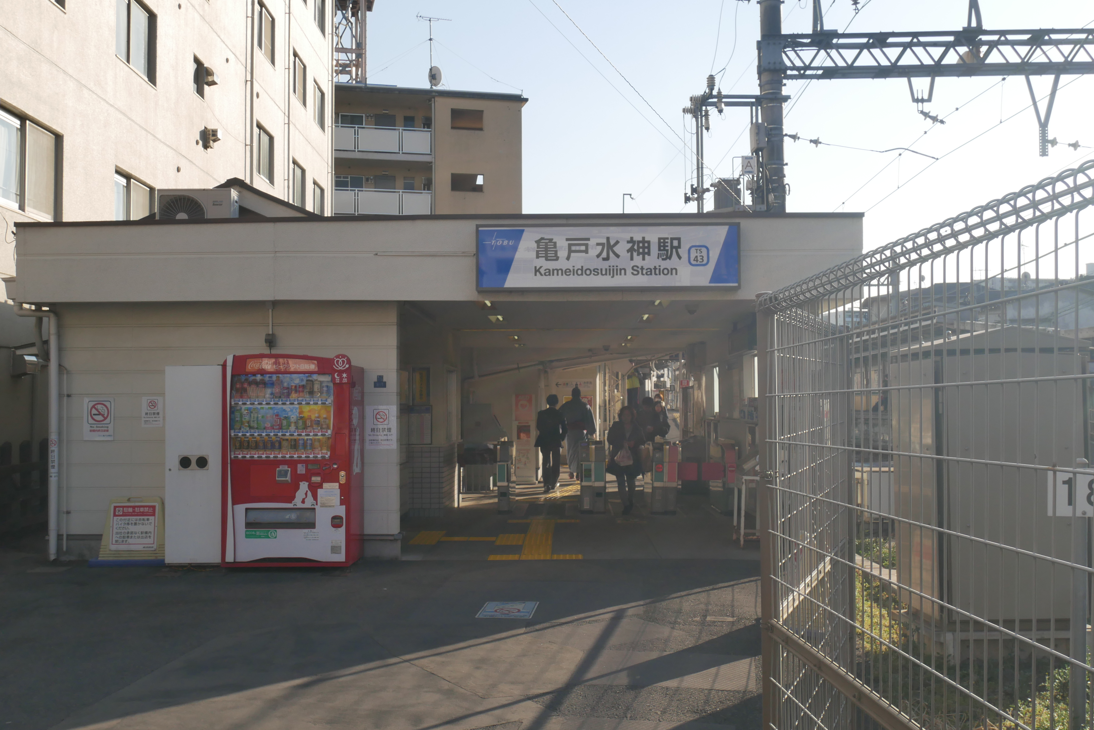 亀戸水神駅 (Kameidosuijin Station)